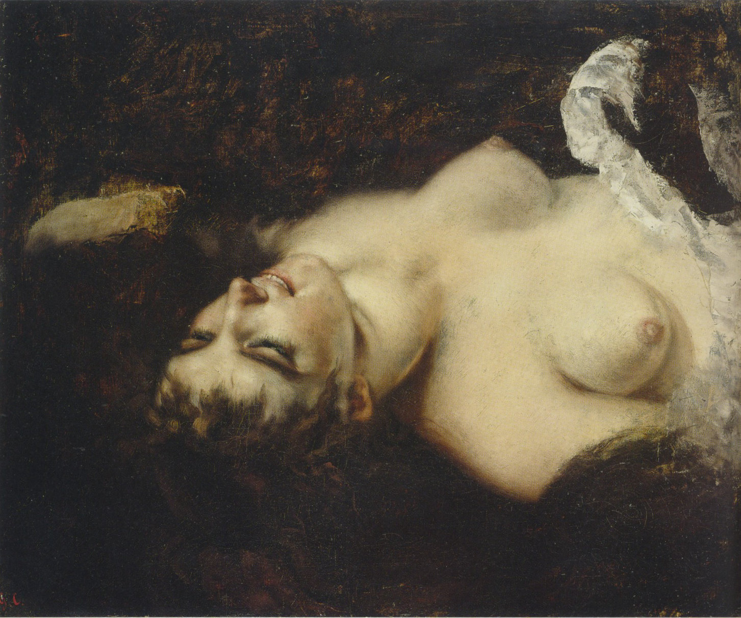 Femme nue, étude pour La Femme au Perroquet Drawing 60 x 73 cm Private collection